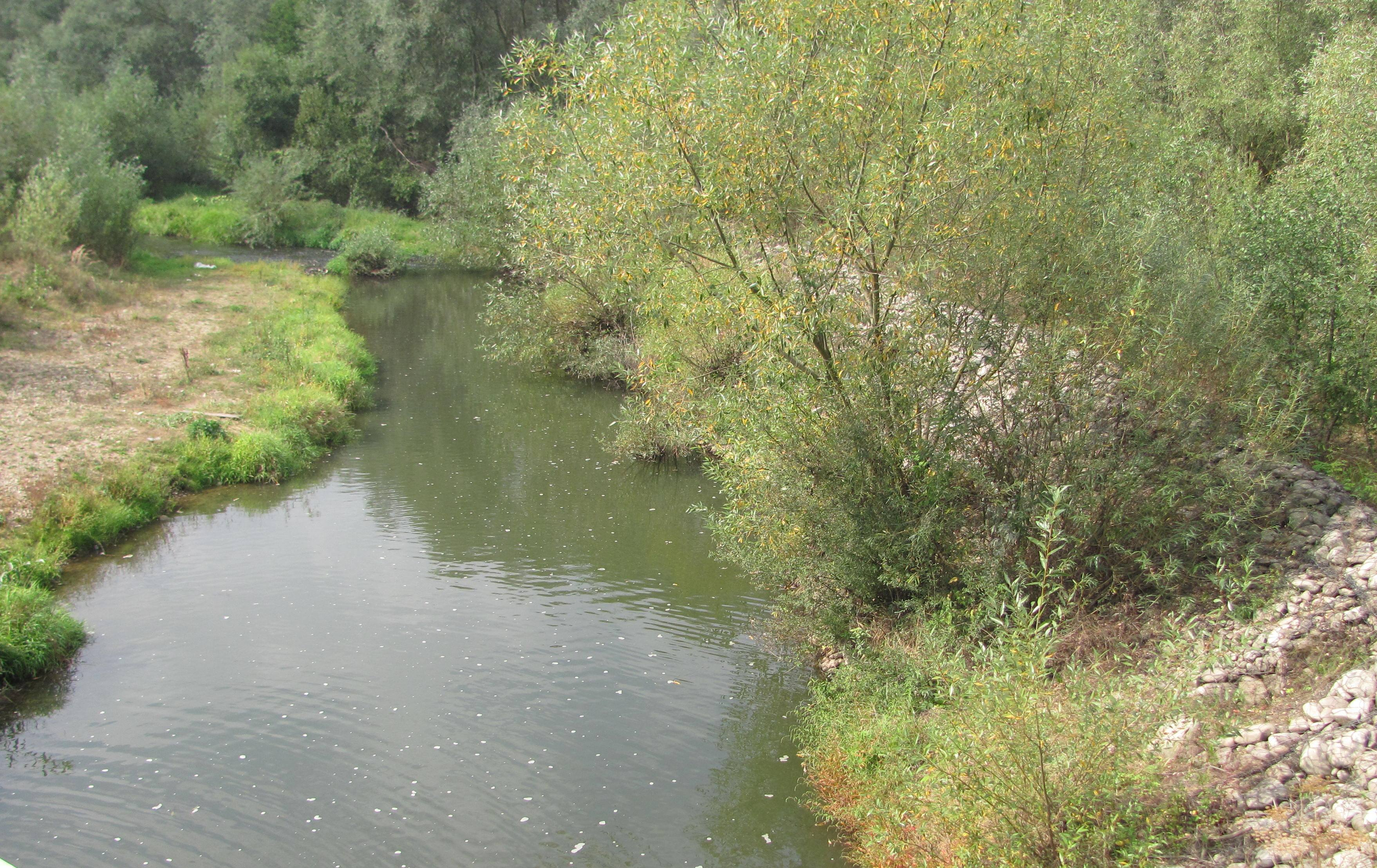 Річка Болохівка, район села Томашівці